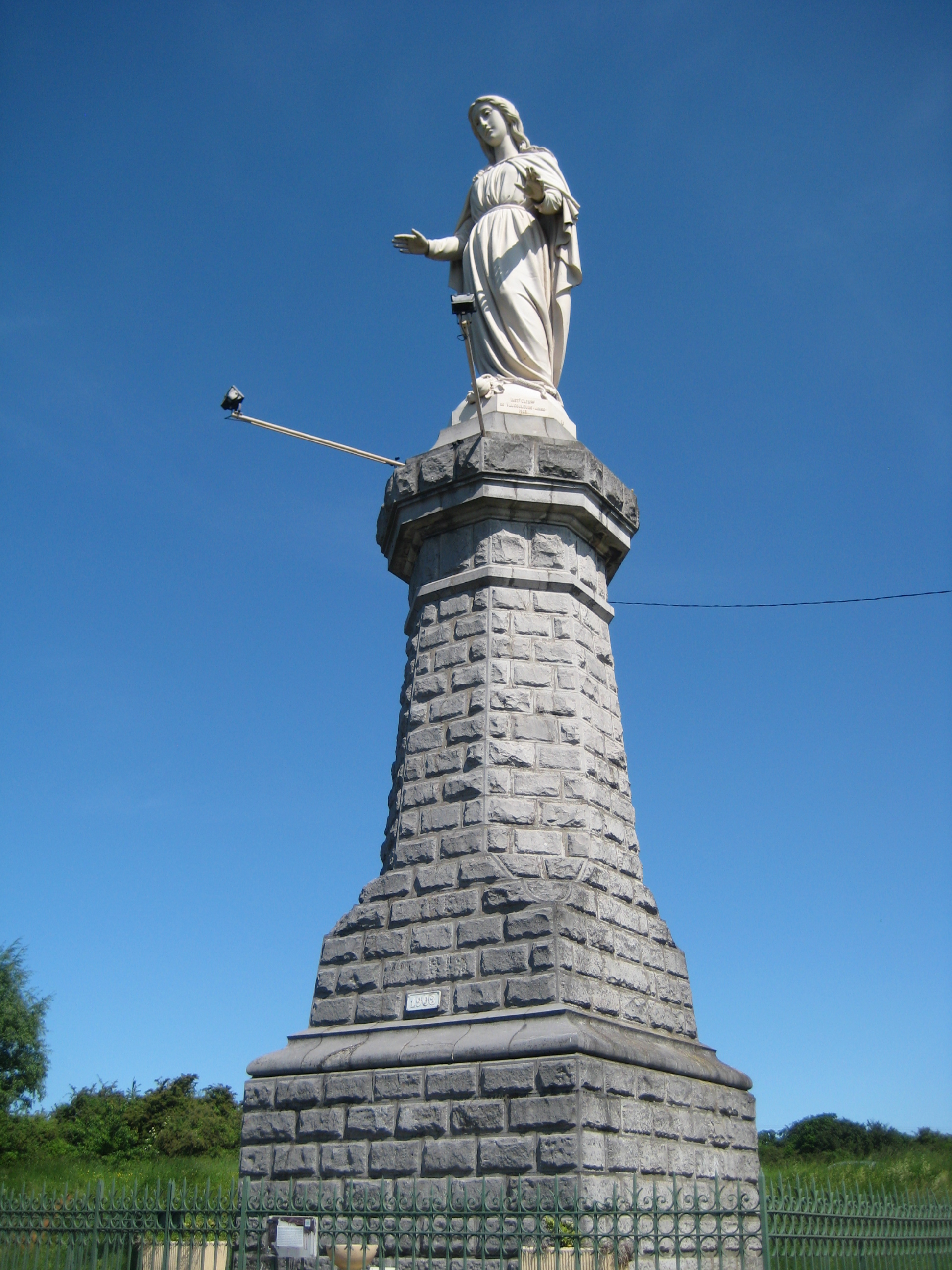 Description Vierge d'Hayange (Moselle) Date22 May 2009Sourcemon appareil photoAuthorAimelaime Vierge d'Hayange (Moselle)